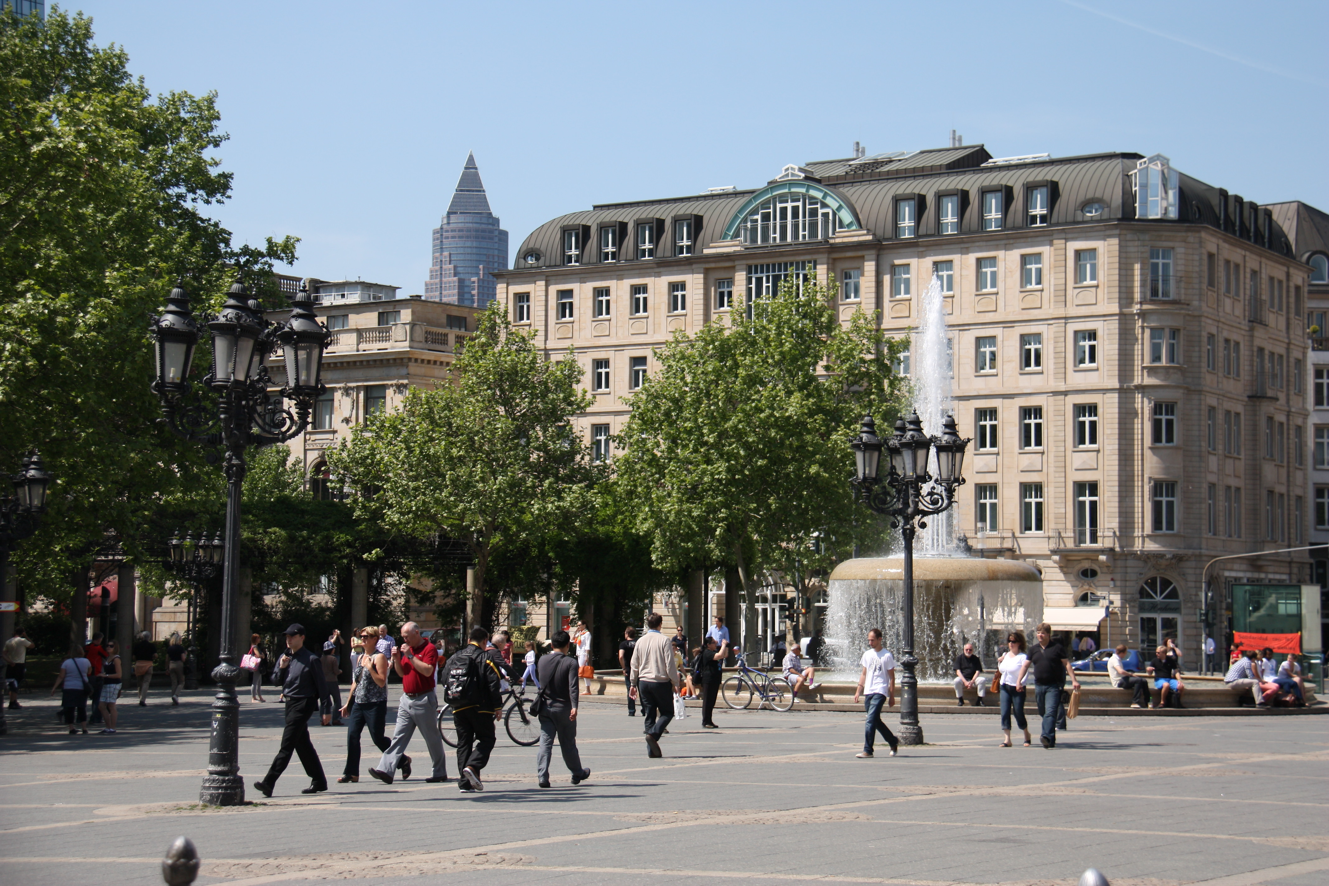 Der Opernplatz befindet sich direkt vor der Alten Oper in Frankfurt. Nach Osten geht er in die Große Bockenheimer Straße (besser bekannt als "Fressgass"), nach Süden in die Taunusanlage über. Der sog. Lucae-Brunnen wurde 1872 von dem Architekten der sog. ALTEN OPER Richard Lucae (1829–1877) entworfen, aber erst 1983, 100 Jahre später, vom Bildhauer Edwin Hüller realisiert. Er ist 120 Tonnen schwer und aus Granit. Sein Becken hat einen Durchmesser von 17 Meter und seine Schale 5 Meter. Er ist 3,20 m hoch. Hinter dem Brunnen sieht man das ehemalige Hotel IMPERIAL in der Taunusanlage, Ecke Bockenheimer Landstraße, von 1907, das durch Ausbruch des Krieges wenig erfolgreich war und schon vor seiner Sanierung zum Bürohaus mutierte. Die Bauherren kamen aus der Ungarisch-Frankfurter Hoteliersfamilie Gömöri, die in Frankfurt u.a. das Parkhotel KAISERHOF am Wiesenhüttenplatz erbauen ließen und erfolgreich betrieben. Im Hintergrund ist der Messeturm zu erkennen.